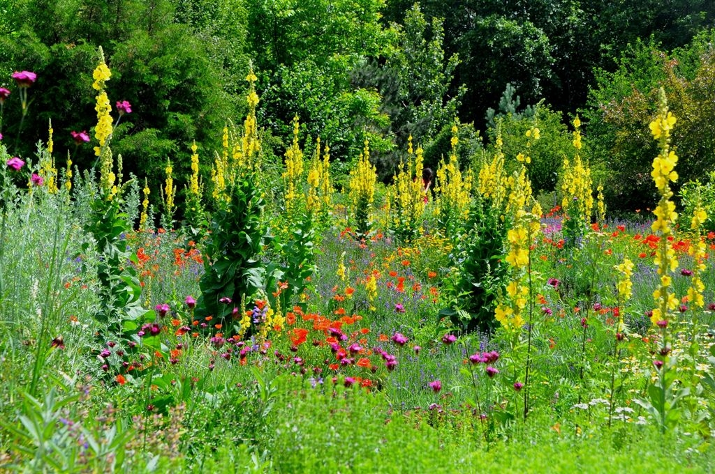 Erlanger Aromagarten